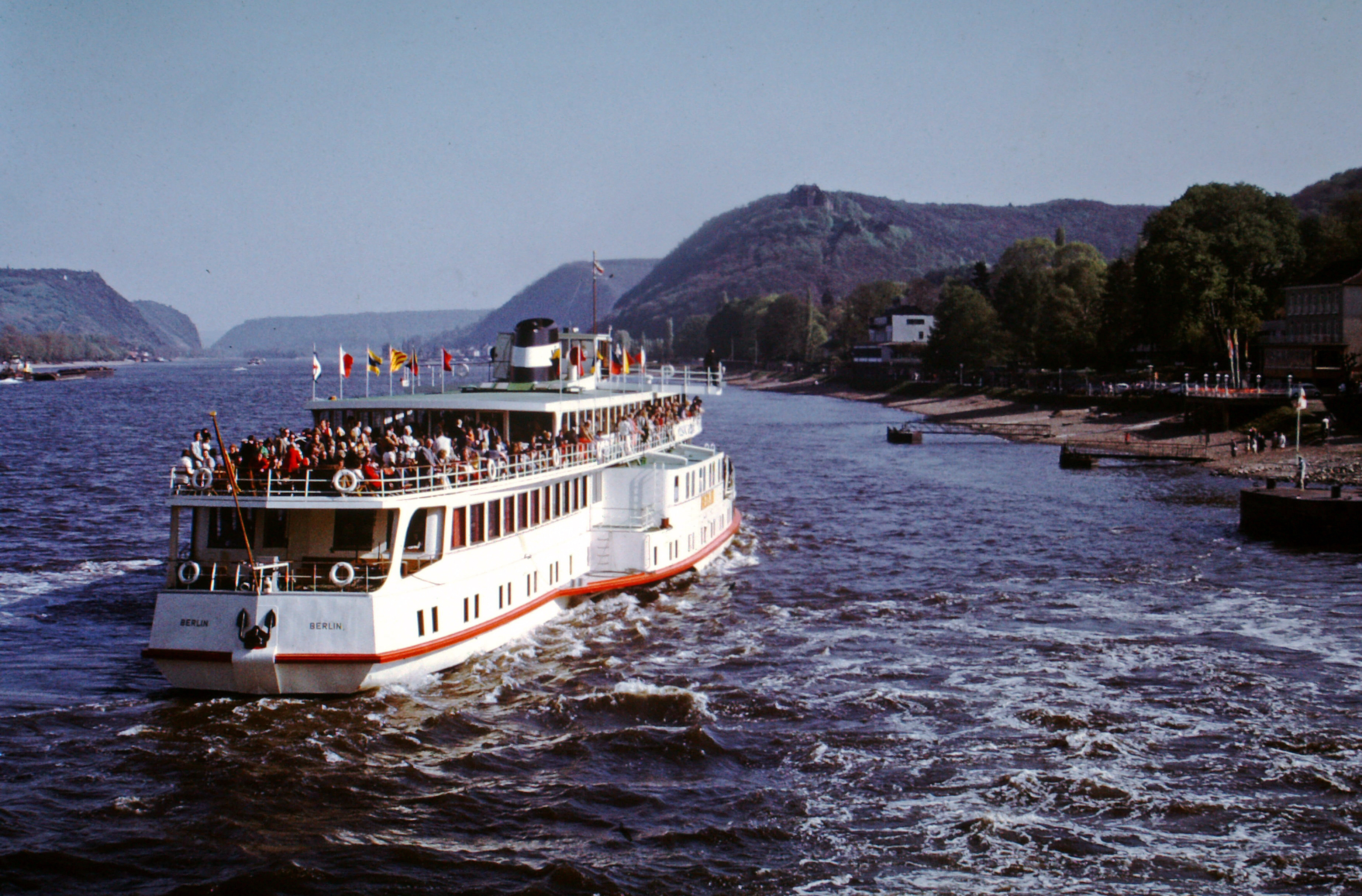 Fahrgastschiff Berlin auf Fahrt in Bad Breisig.